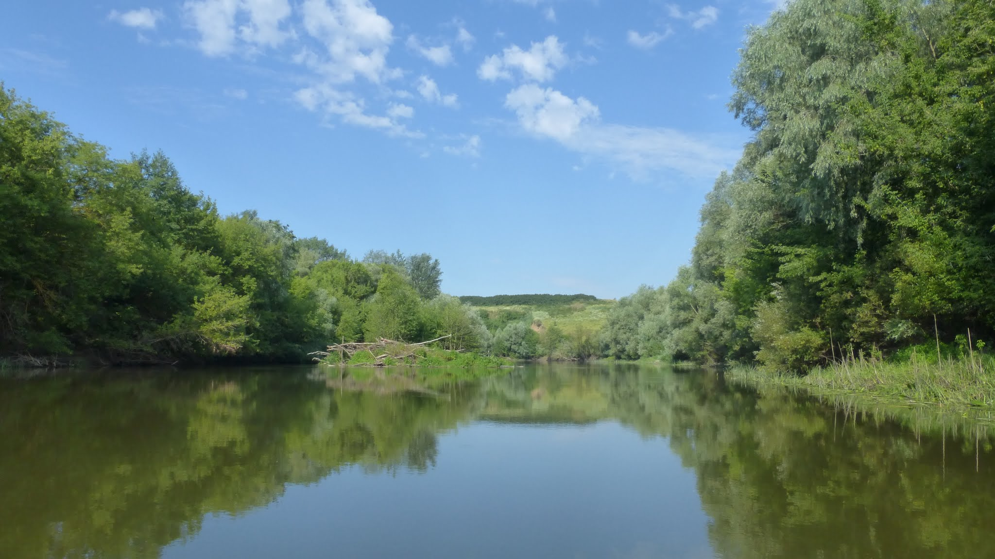 Uvarovsky District, Tambov Oblast, Russia